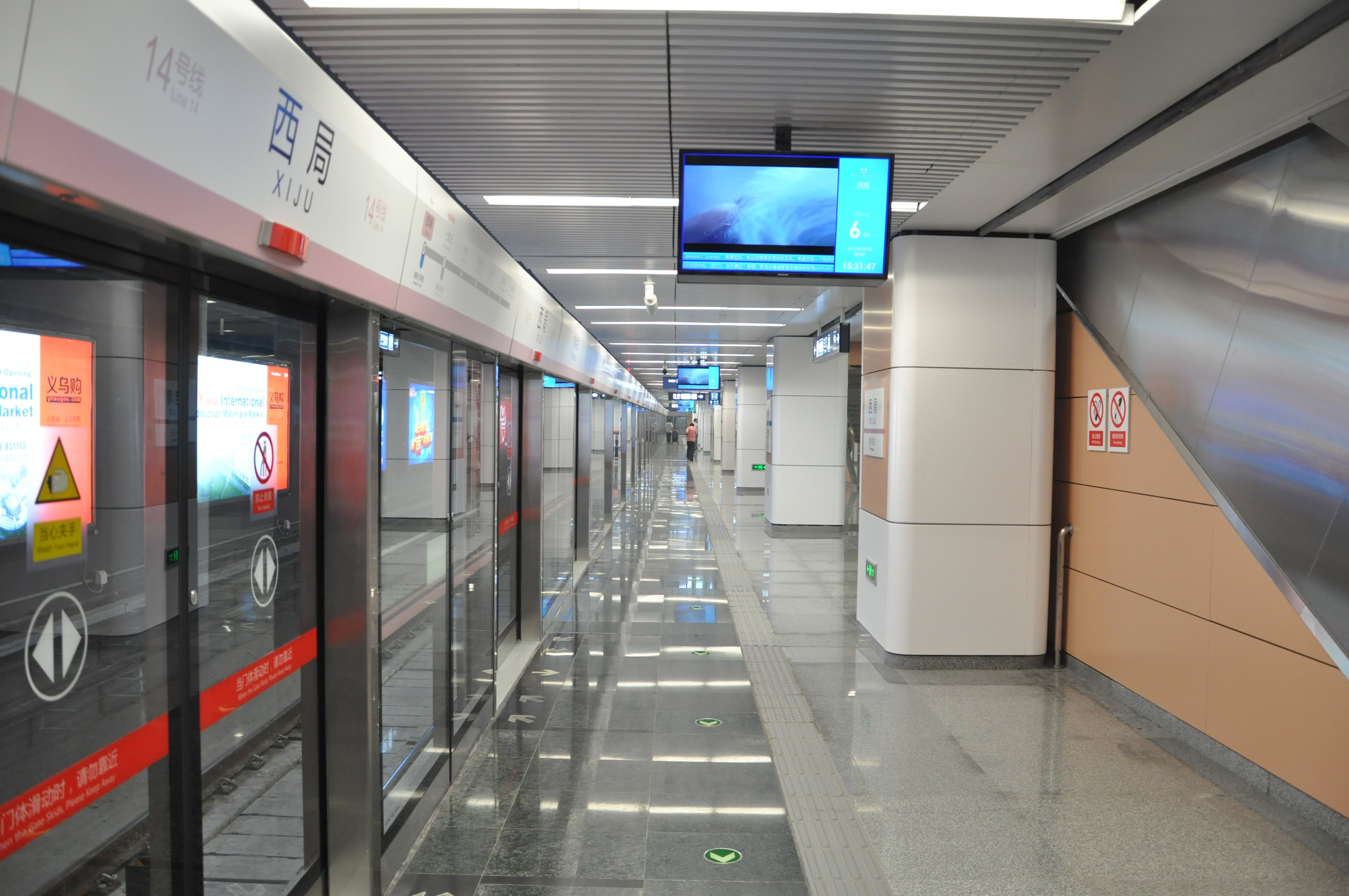 北京地铁14号线西局站站台